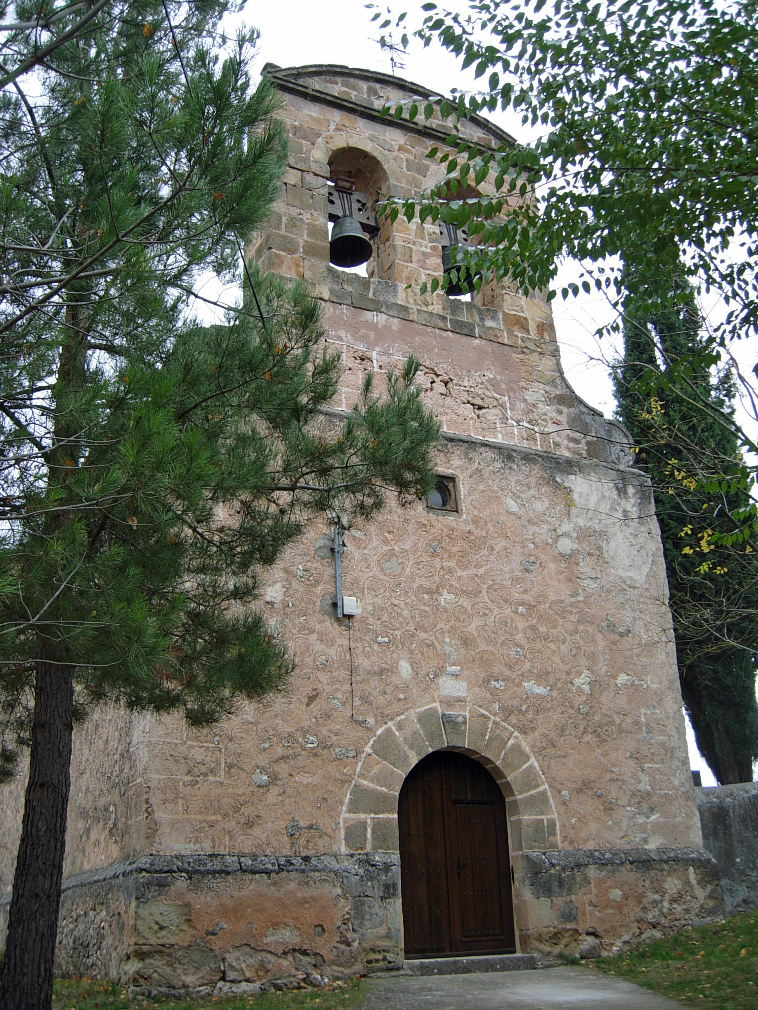 Iglesia Barroca en Huérmeces del Cerro